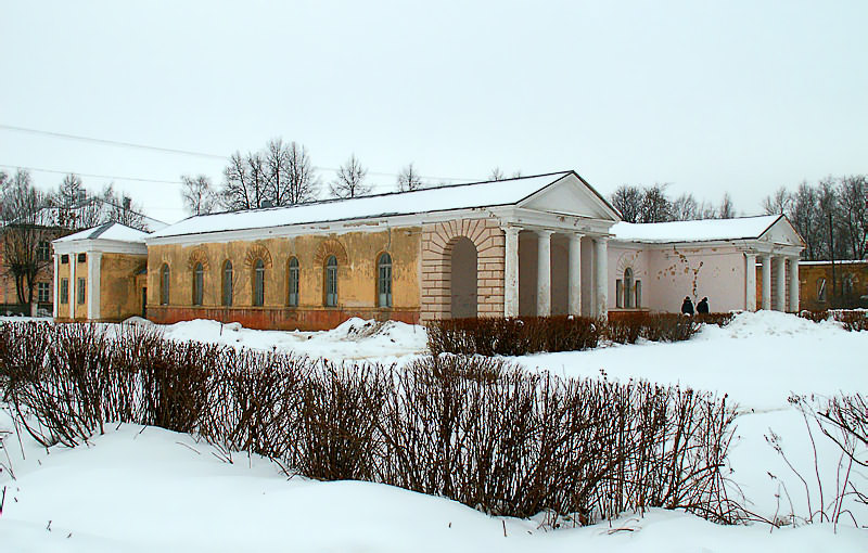 Вичуга: Художественный музей (бывш. особняк для служащих), 1910-е, арх. И. Жолтовский.